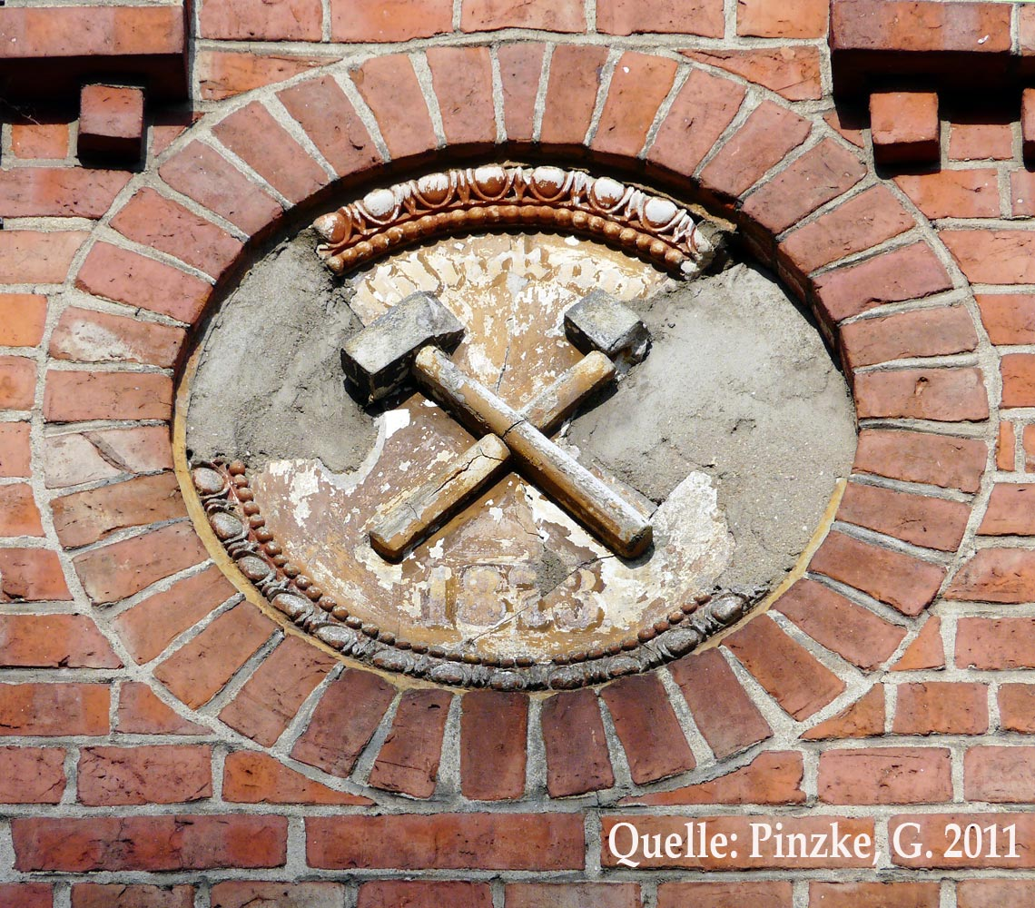 Bergbausymbol am ehem. Steigerhaus in Schönholz (Inschrift: "Glück auf, 1873")